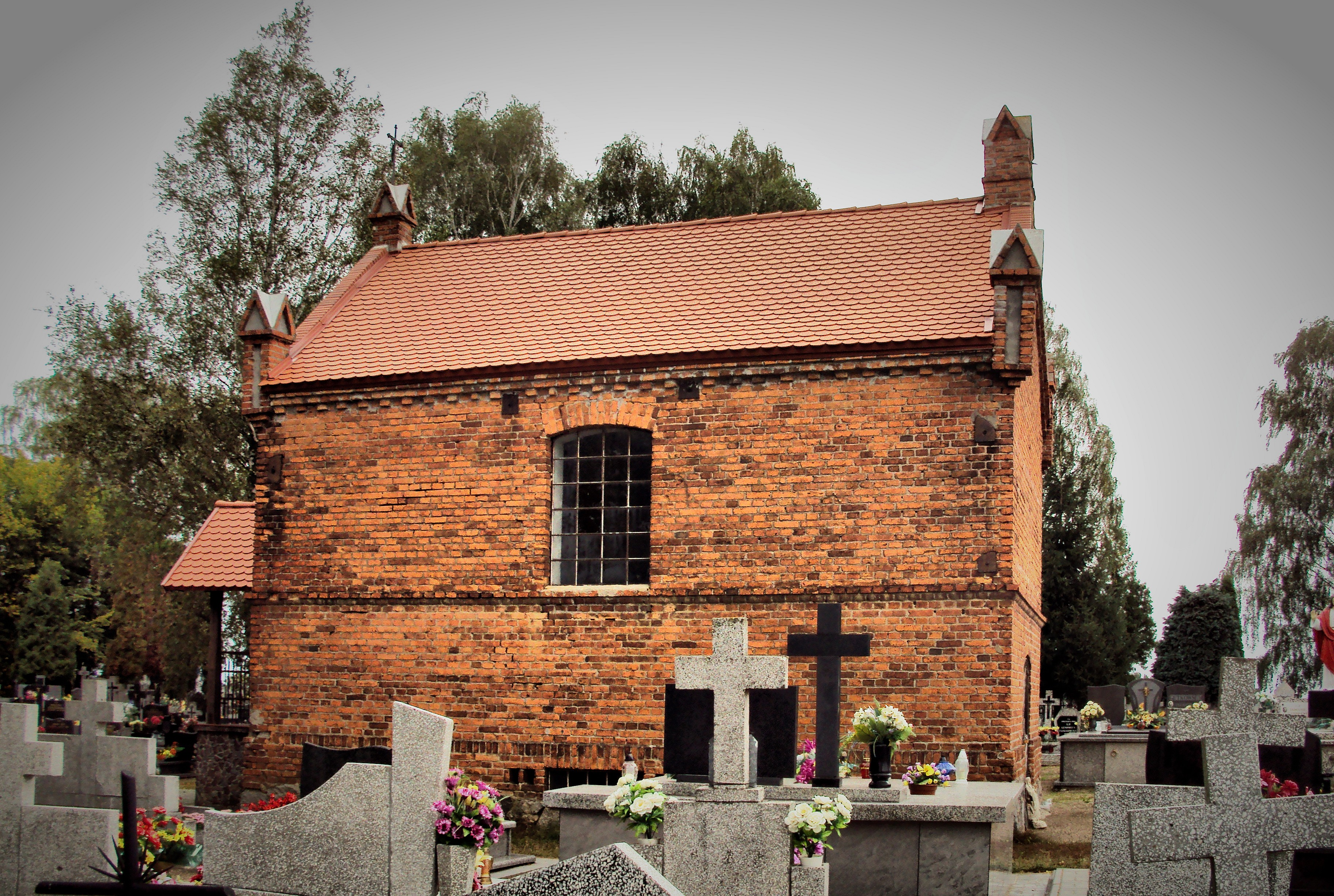 kaplica grobowa rodziny Małkiewiczów, na cmentarzu par., 1870 Strzygi, Gmina Osiek